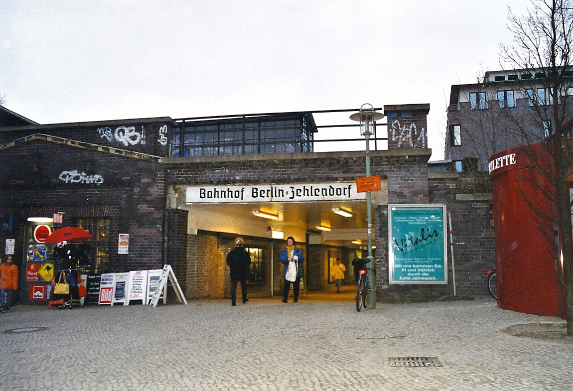 Eingang zum Bahnhof Berlin Zehlendorf auf der Südseite